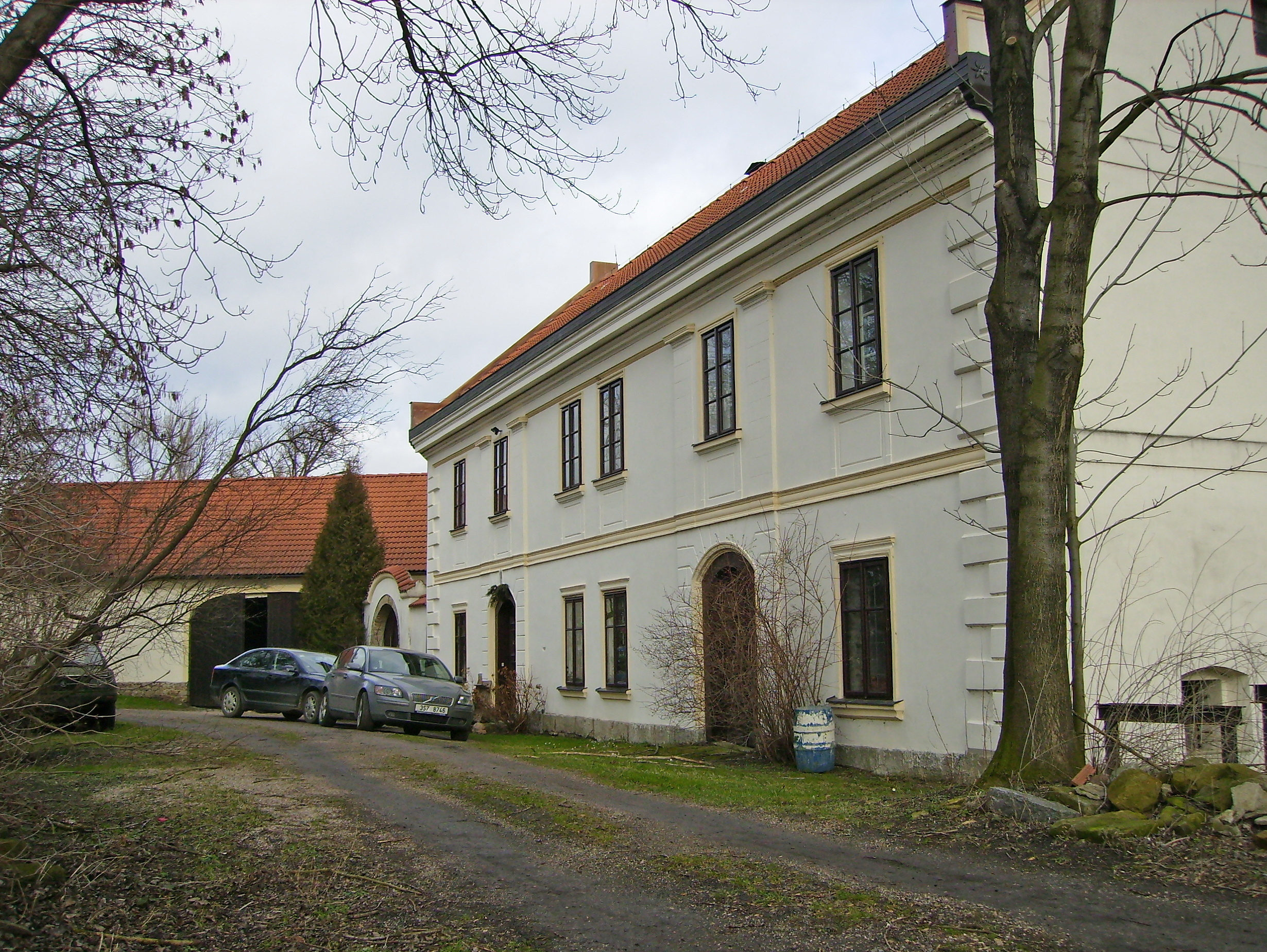 Přerovská obora z jihu.